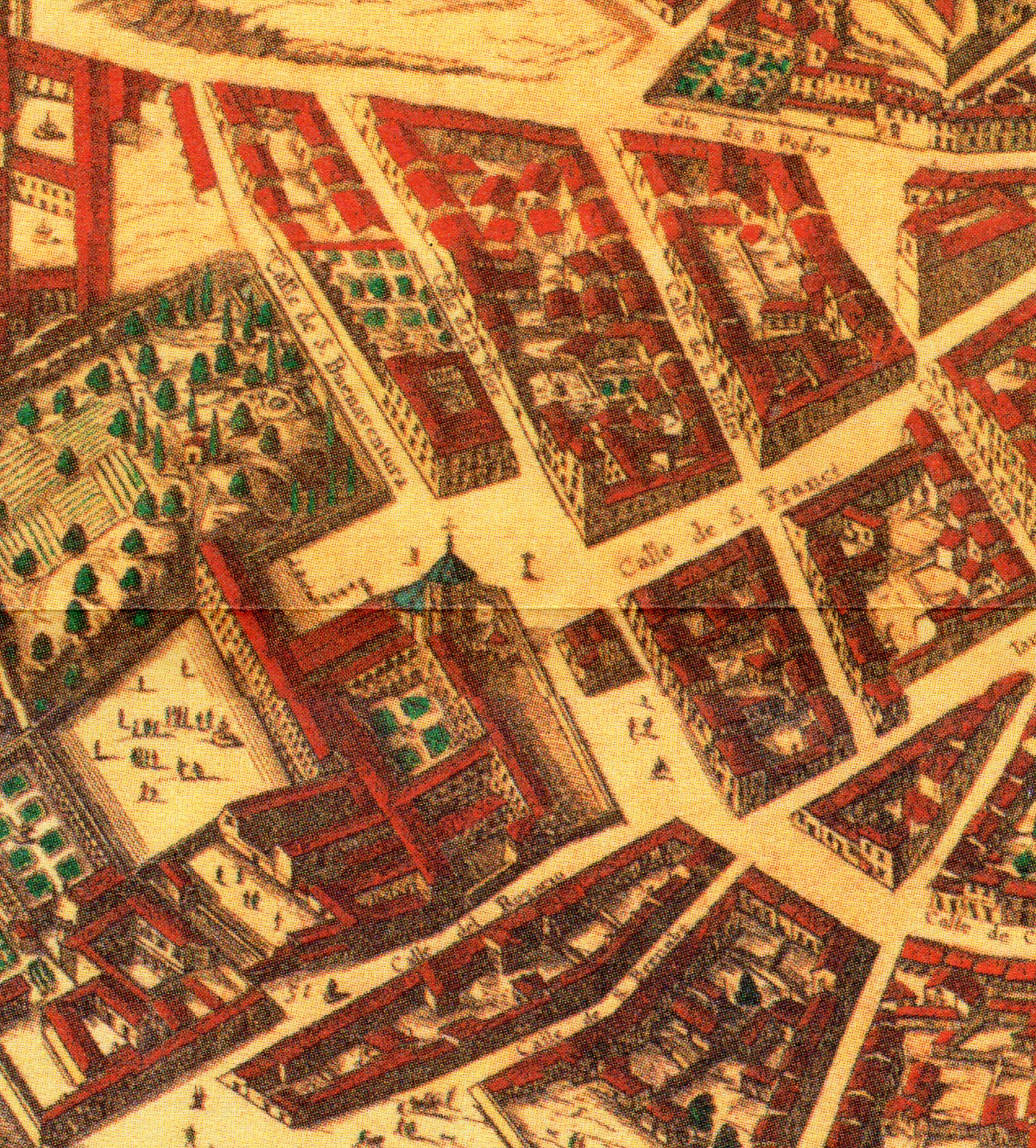 Topografía de la Villa de Madrid descrita por Don Pedro Texeira en 1656, en la cual se demuestran todas las calles al largo y ancho de cada una de ellas, las rinconadas y lo que tuercen las Plazas, fuentes, jardines y huertas con la disposición que tienen las parroquias, Monasterios y Hospitales están señalados sus nombres con letras y números que se hallaran en la tabla y los demás edificios, torres y delanteras de las casas de la parte que mira al Mediodía están sacadas al natural que se podrán tocar las puertas y ventanas de cada una de ellas.